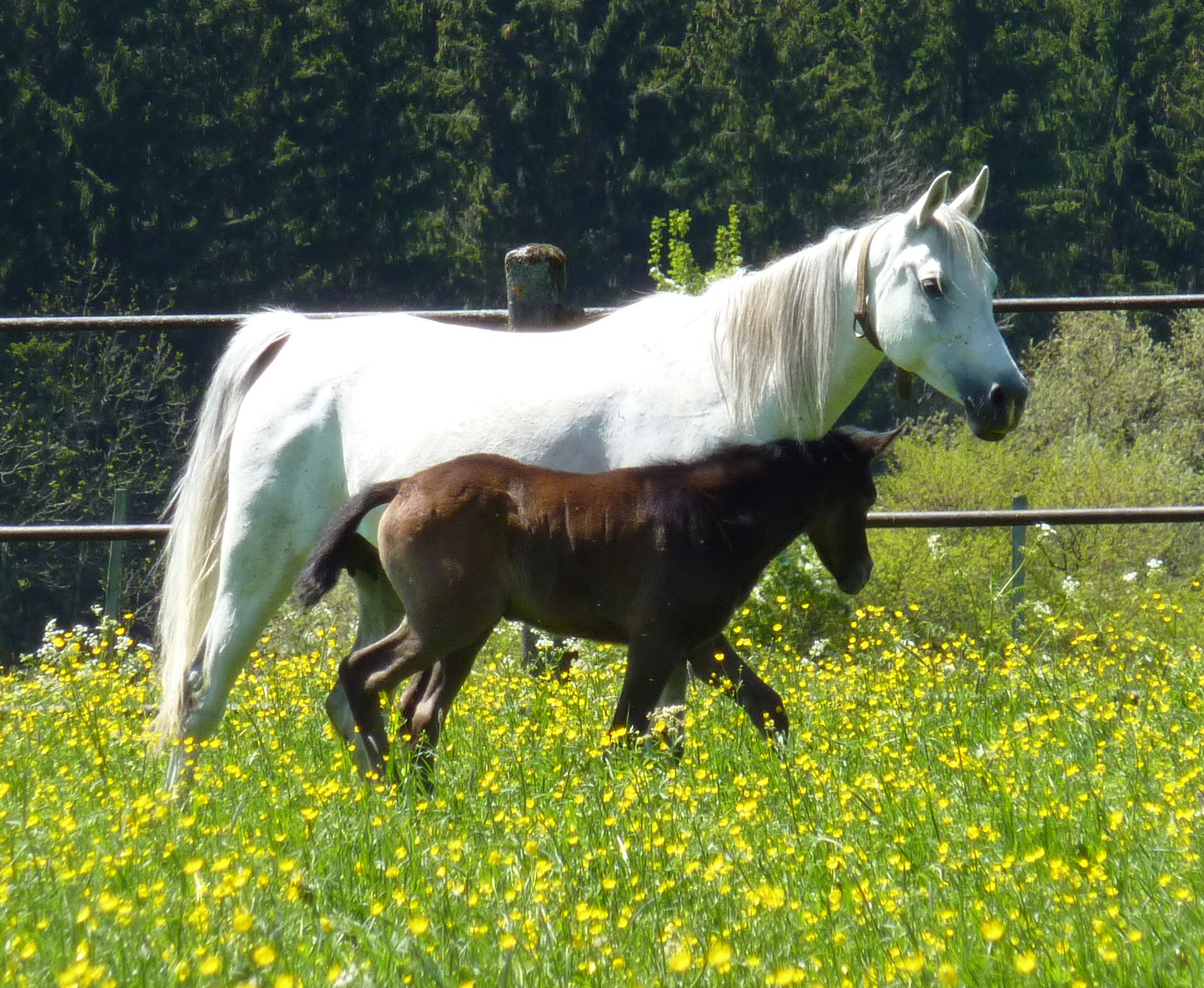 Araberstute mit Fohlen in Marbach